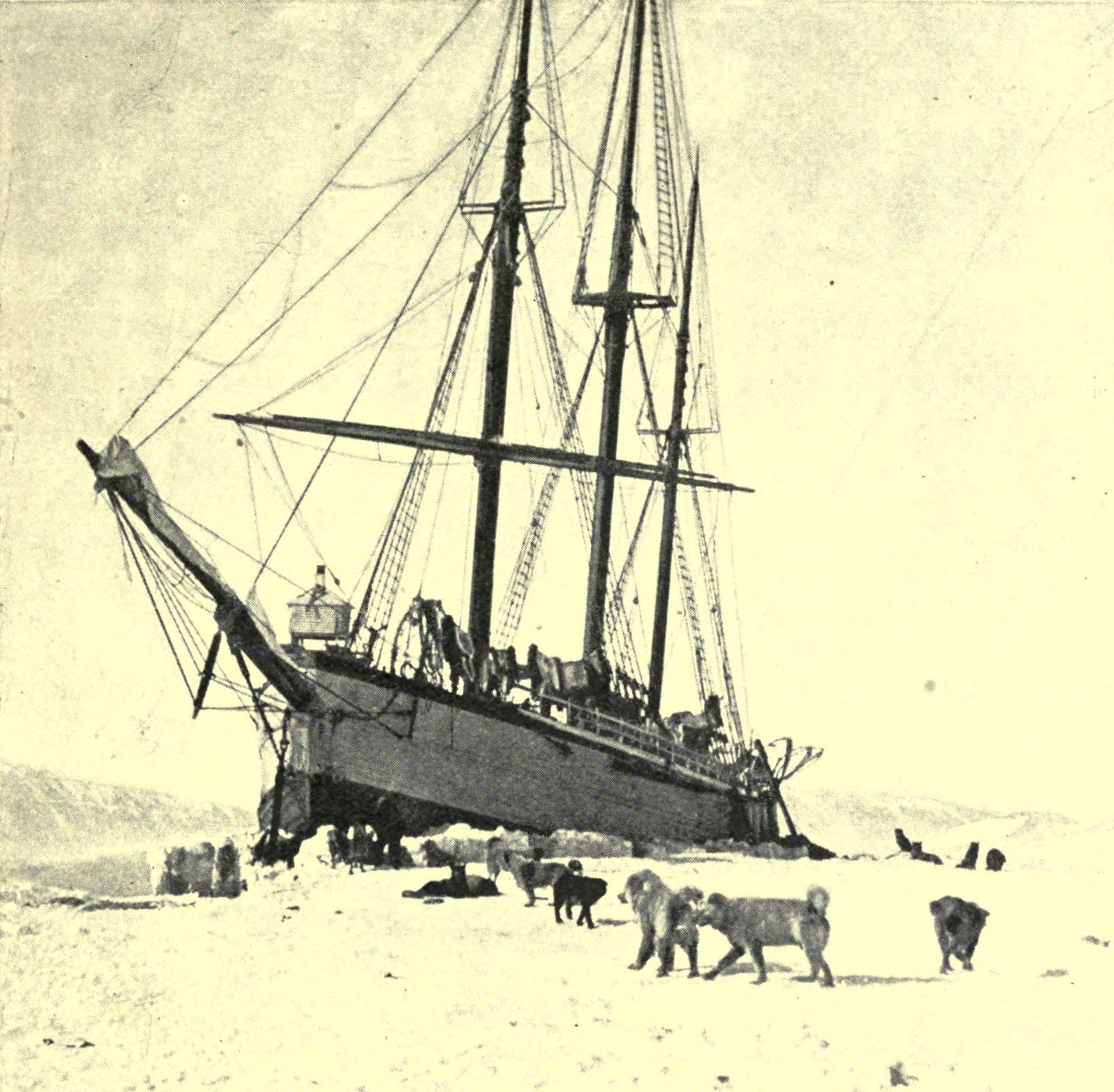 Коабль "Фрам" во время норвежской арктической экспедиции (1898—1902)